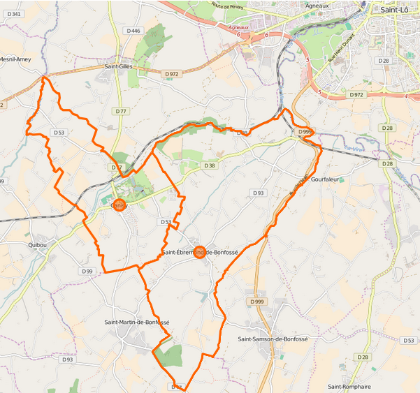 carte de la commune nouvelle et de ses communes déléguées